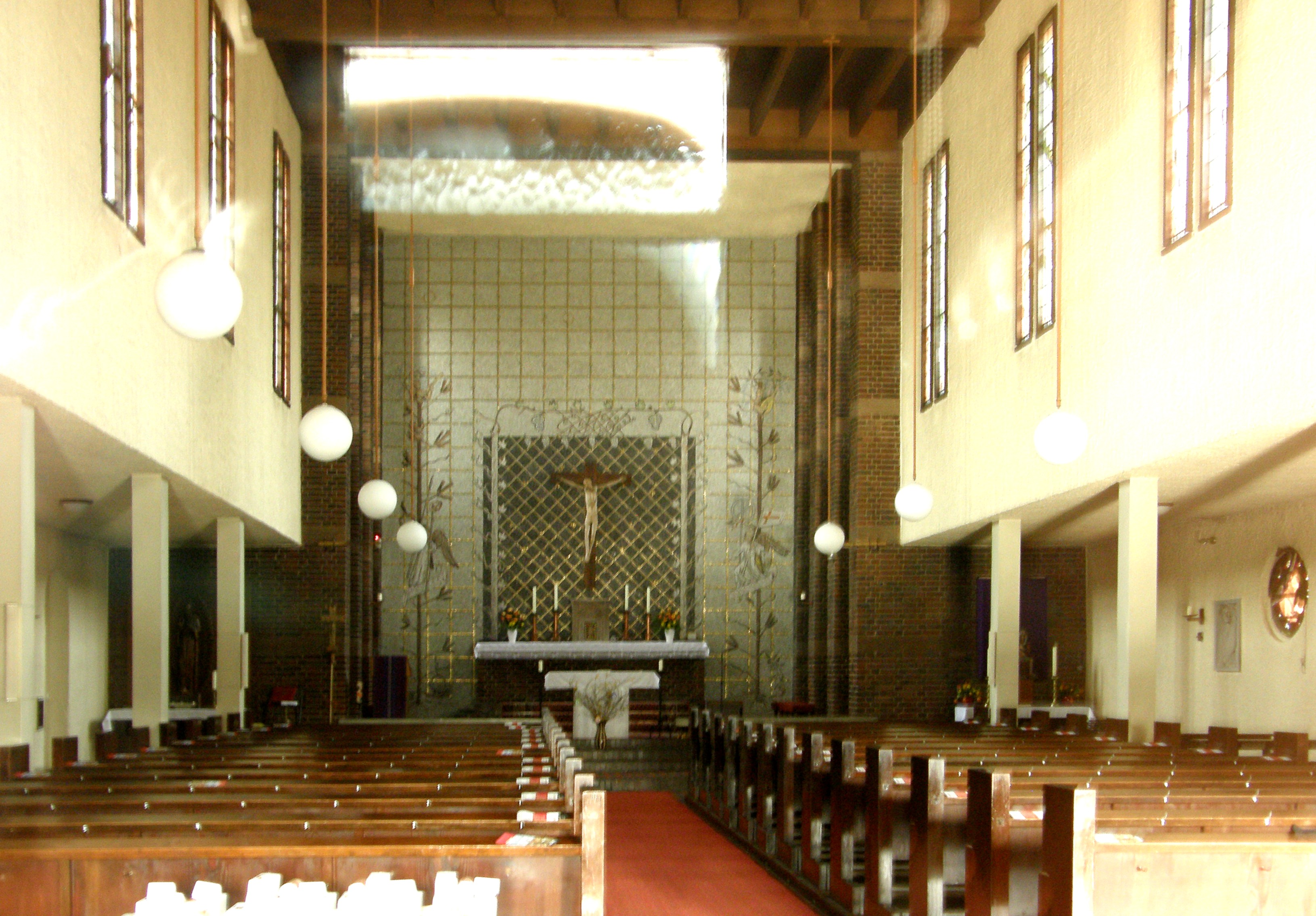 Berlin-Kaulsdorf, St.-Martinskirche: Blick in den Hauptraum